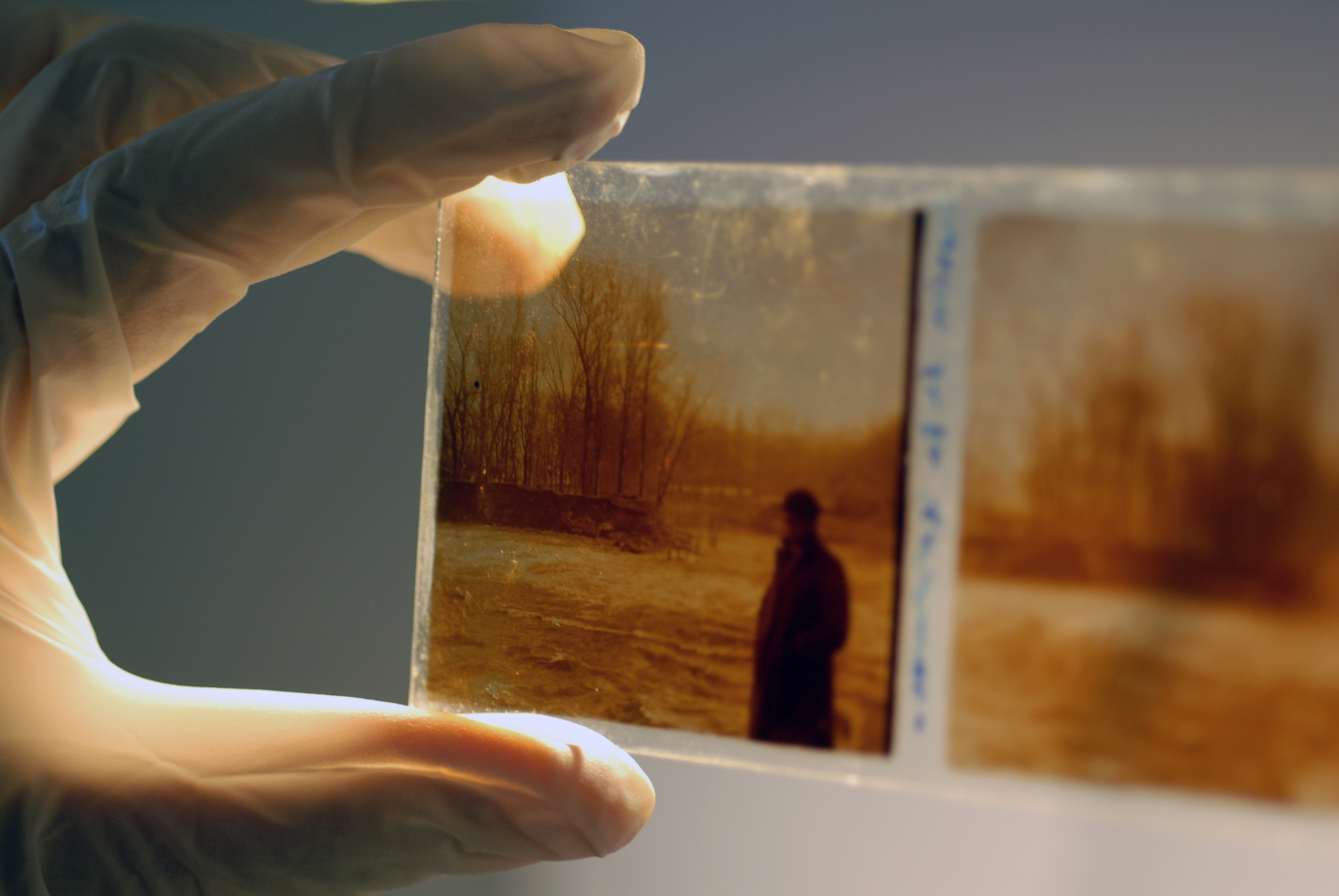 Plaques de verre issue du Fonds Louis Mengaud, conservé au Muséum de Toulouse